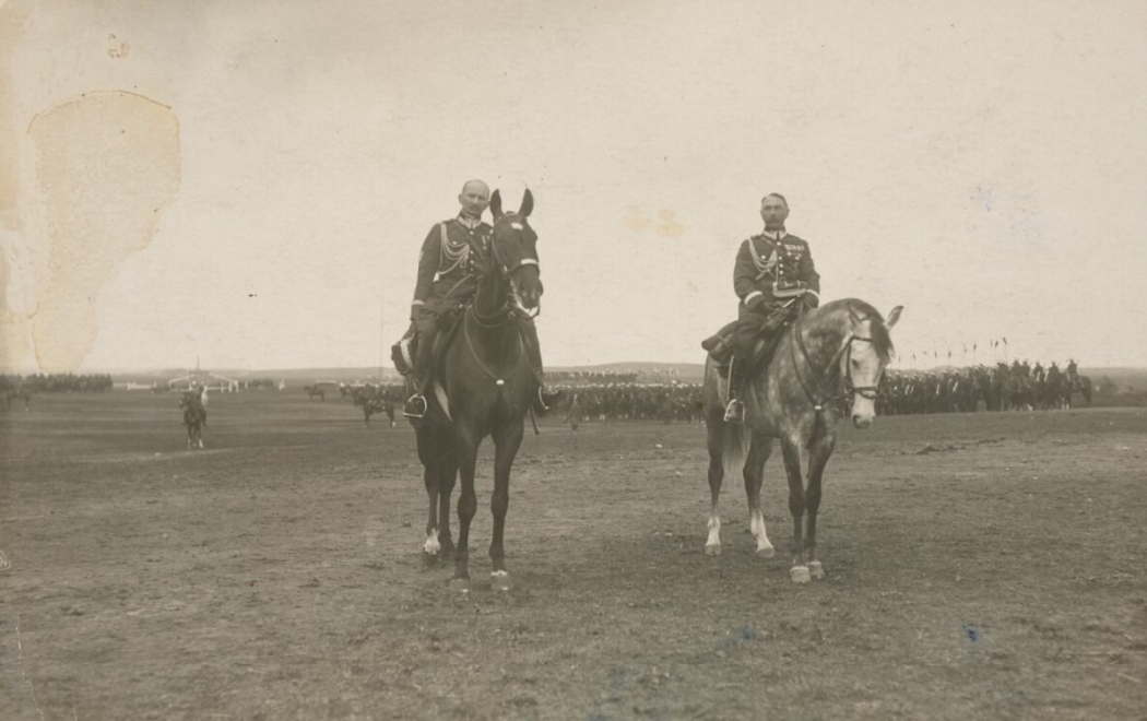 2 Pułk Ułanów Grochowskich im. gen. Dwernickiego 27 05 1928 1 fotografia : odbitka na papierze srebrowo-żelatynowym ; 8,8x13,8 cm